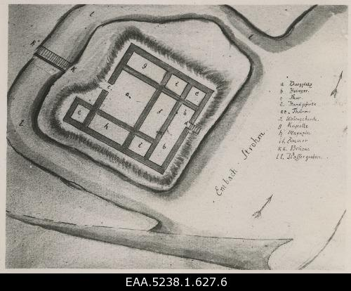 Vana-Kastre piiskopilinnuse põhiplaan, koopia Eduard Philipp Körberi joonisest